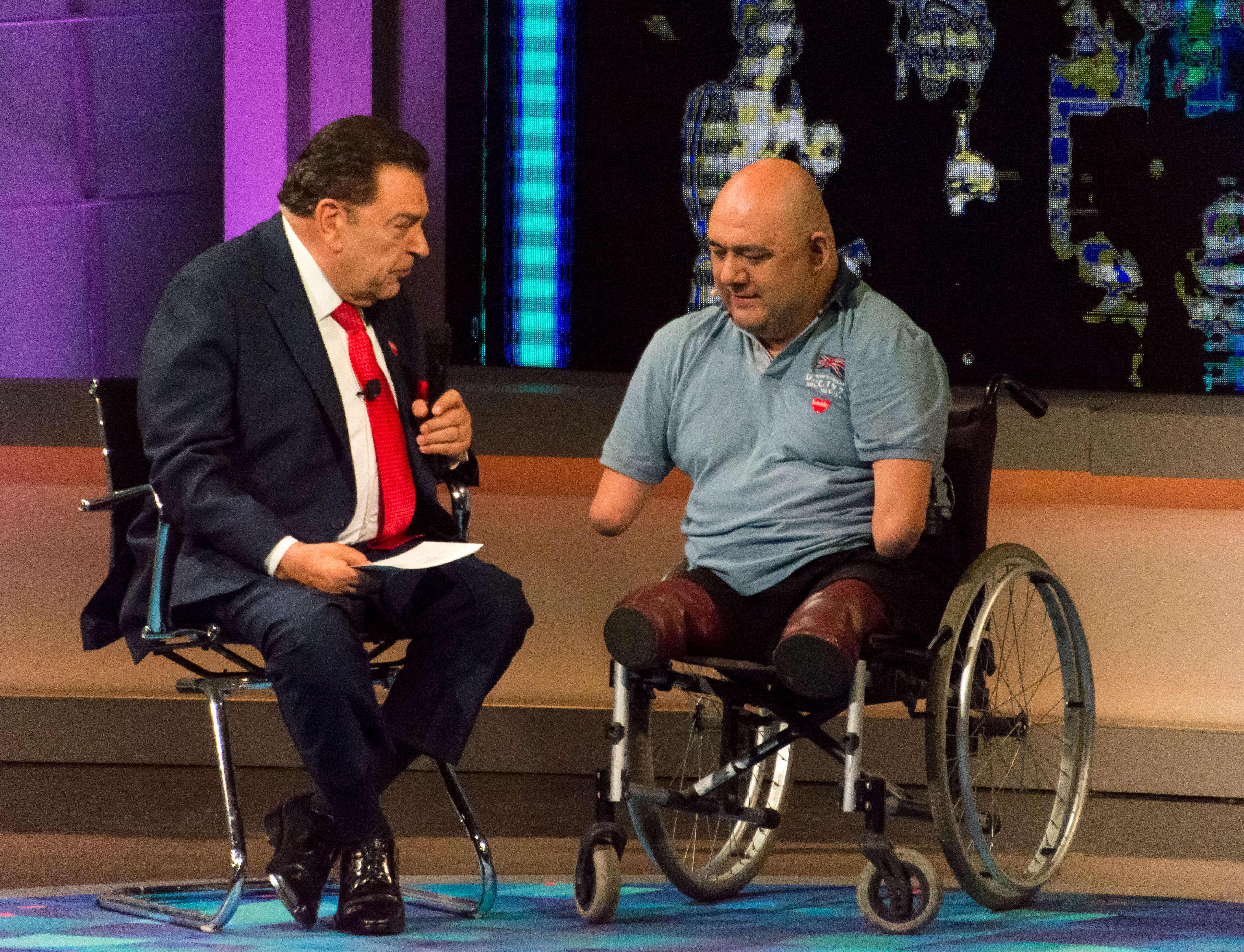 Don Francisco y Carlos Kaiser, Teletón 2018, Teatro Teletón, Santiago, Chile.